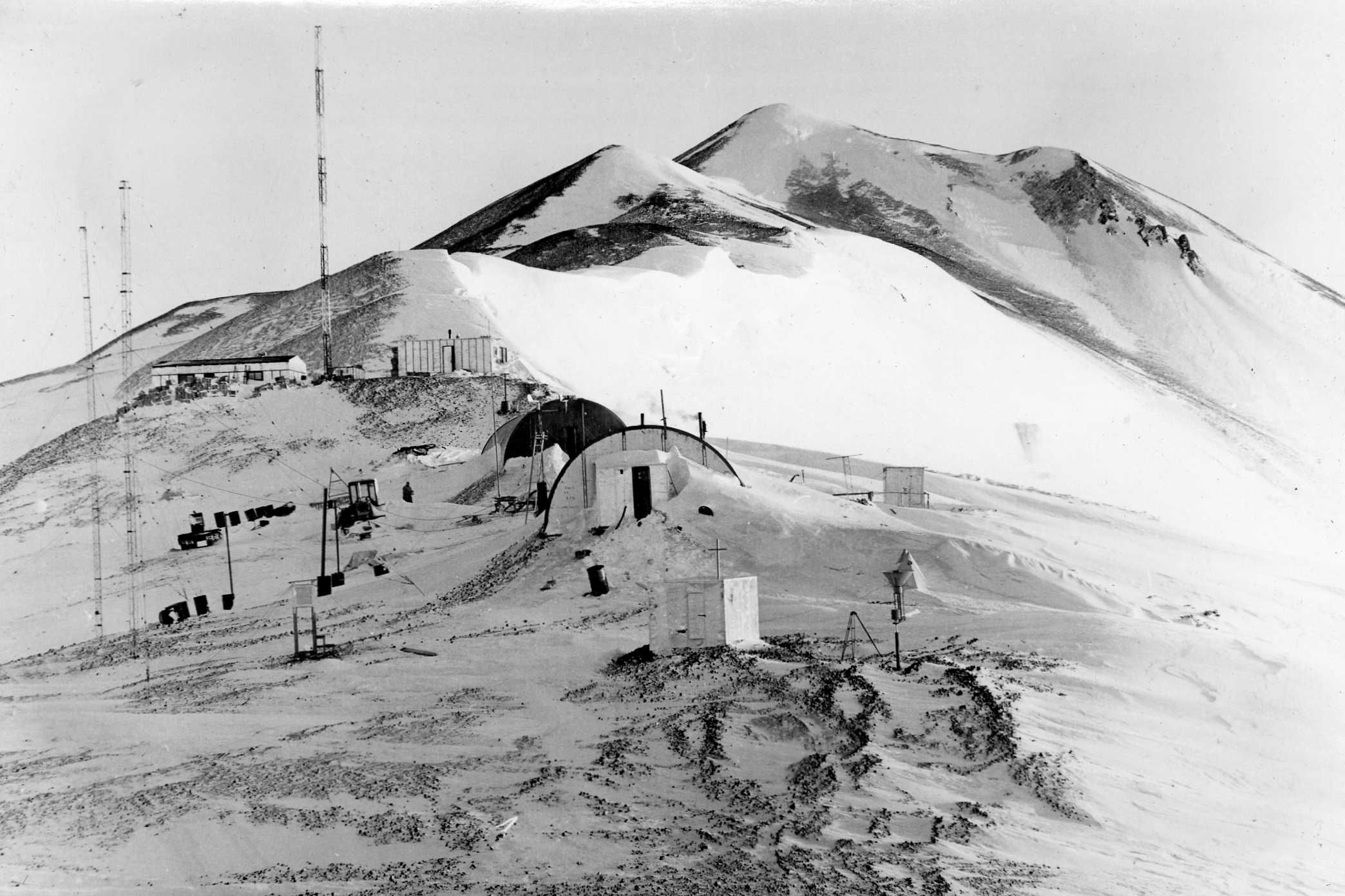 Base Conjunta Matienzo año 1962